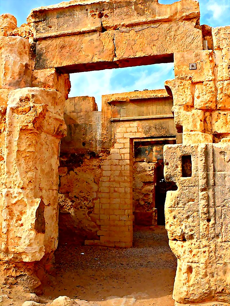 le Temple d'Oracle